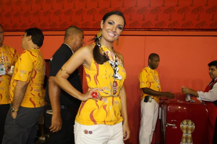 A jornalista e apresentadora Patrícia Poeta no camarote Devassa.